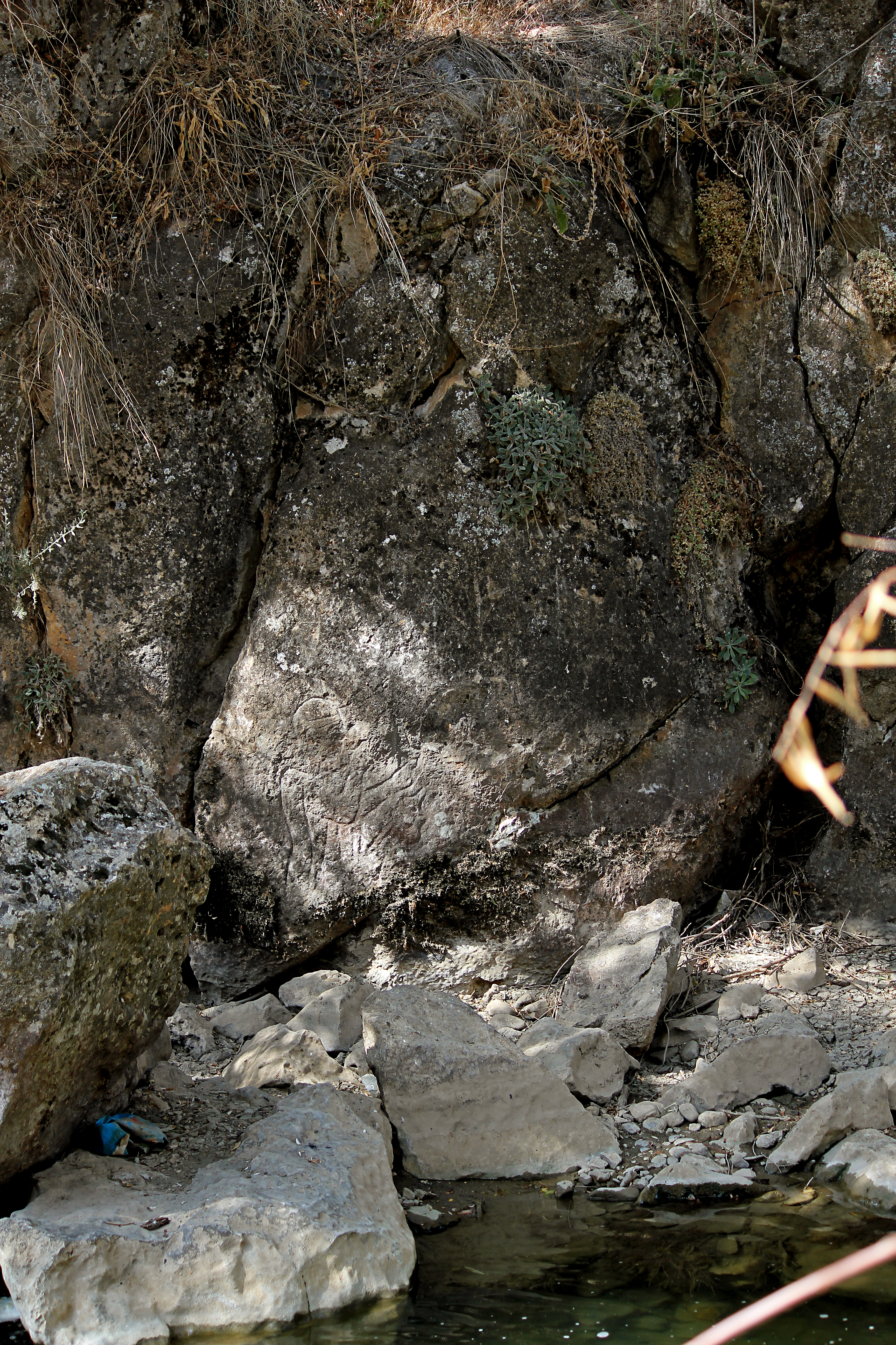 Taşçı B, hethitisches Felsrelief nahe Develi, Zentraltürkei